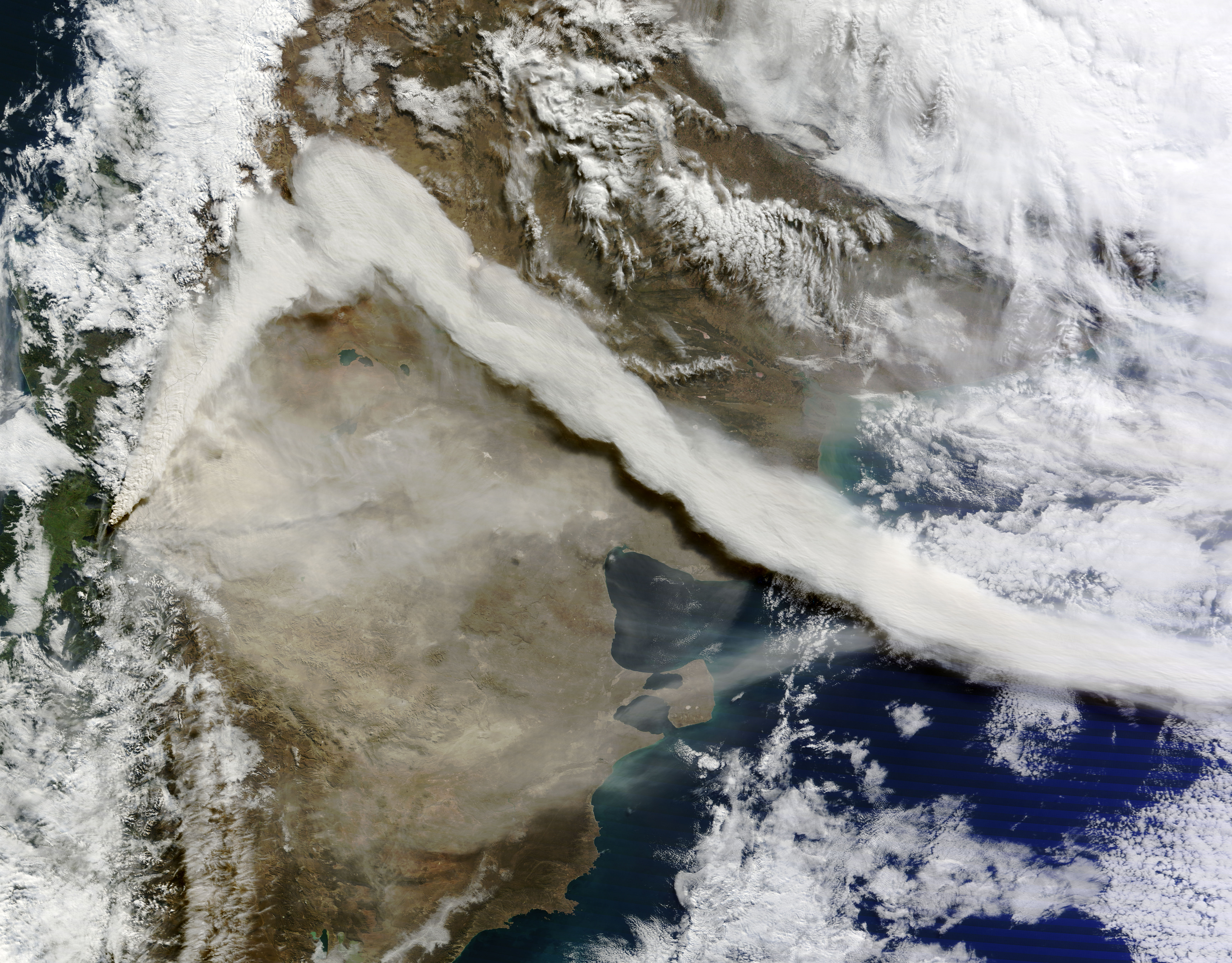 Erupción del Puyehue, June 6 at 14:25 UTC (10:25 a.m. EDT).